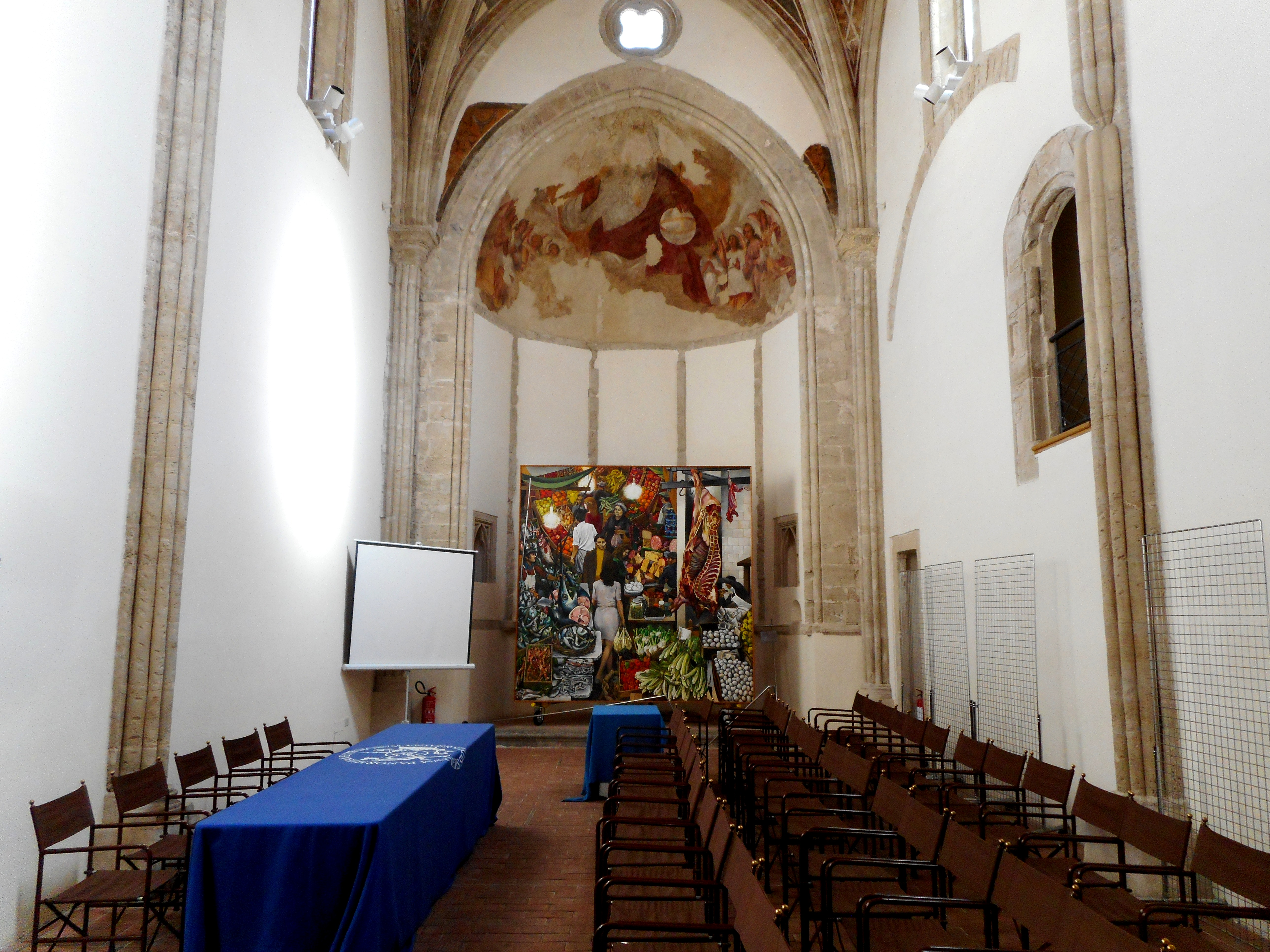 Interno della chiesa di Sant'Antonio Abate allo Steri con la "Vucciria" di Renato Guttuso